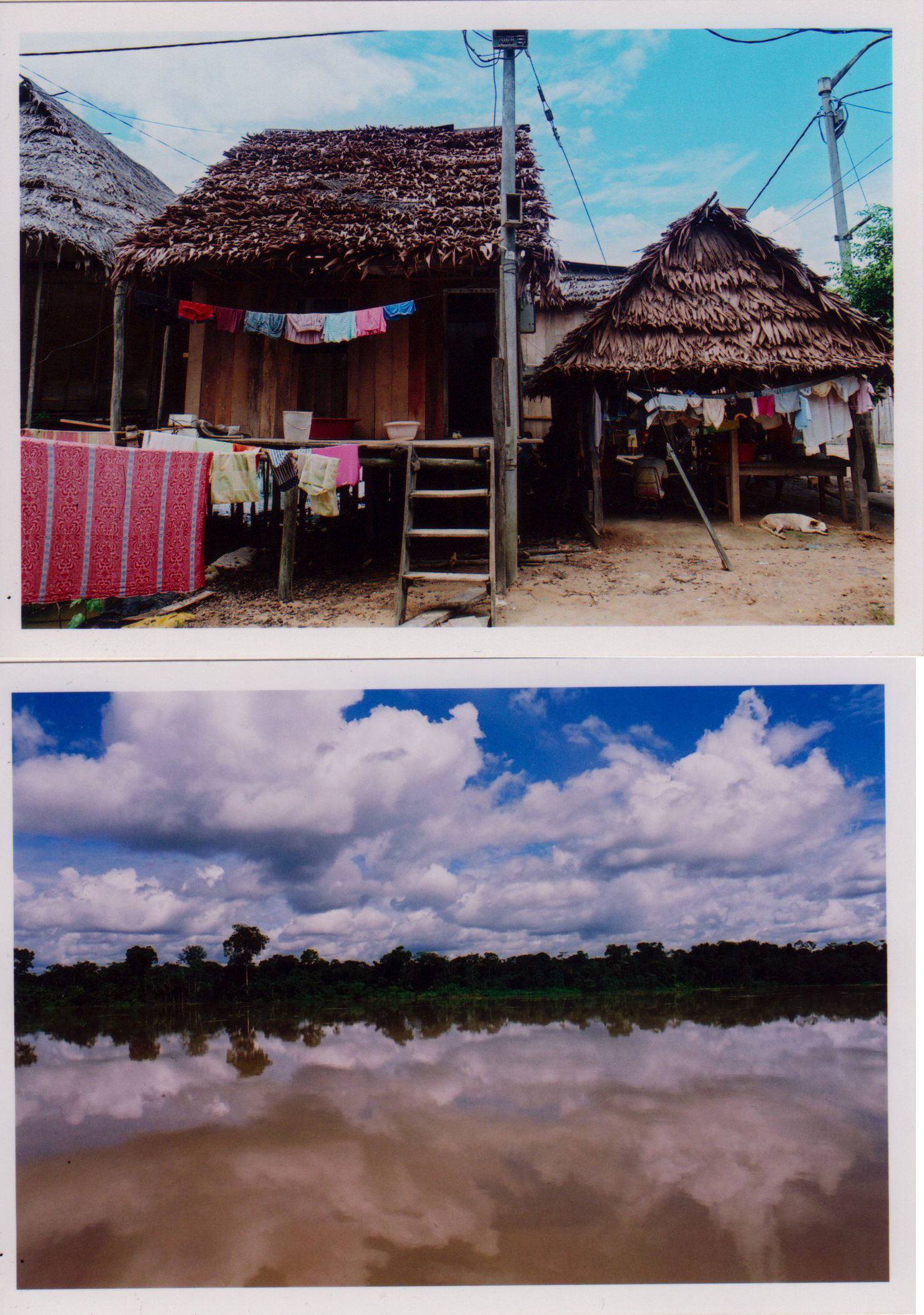 Dos puntos turísticos que encontrados dentro o alrededor de la ciudad de Iquitos.